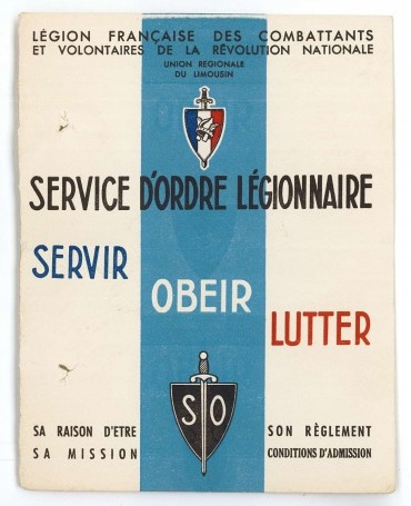 Epaulettes du Service d'ordre légionnaire SOL